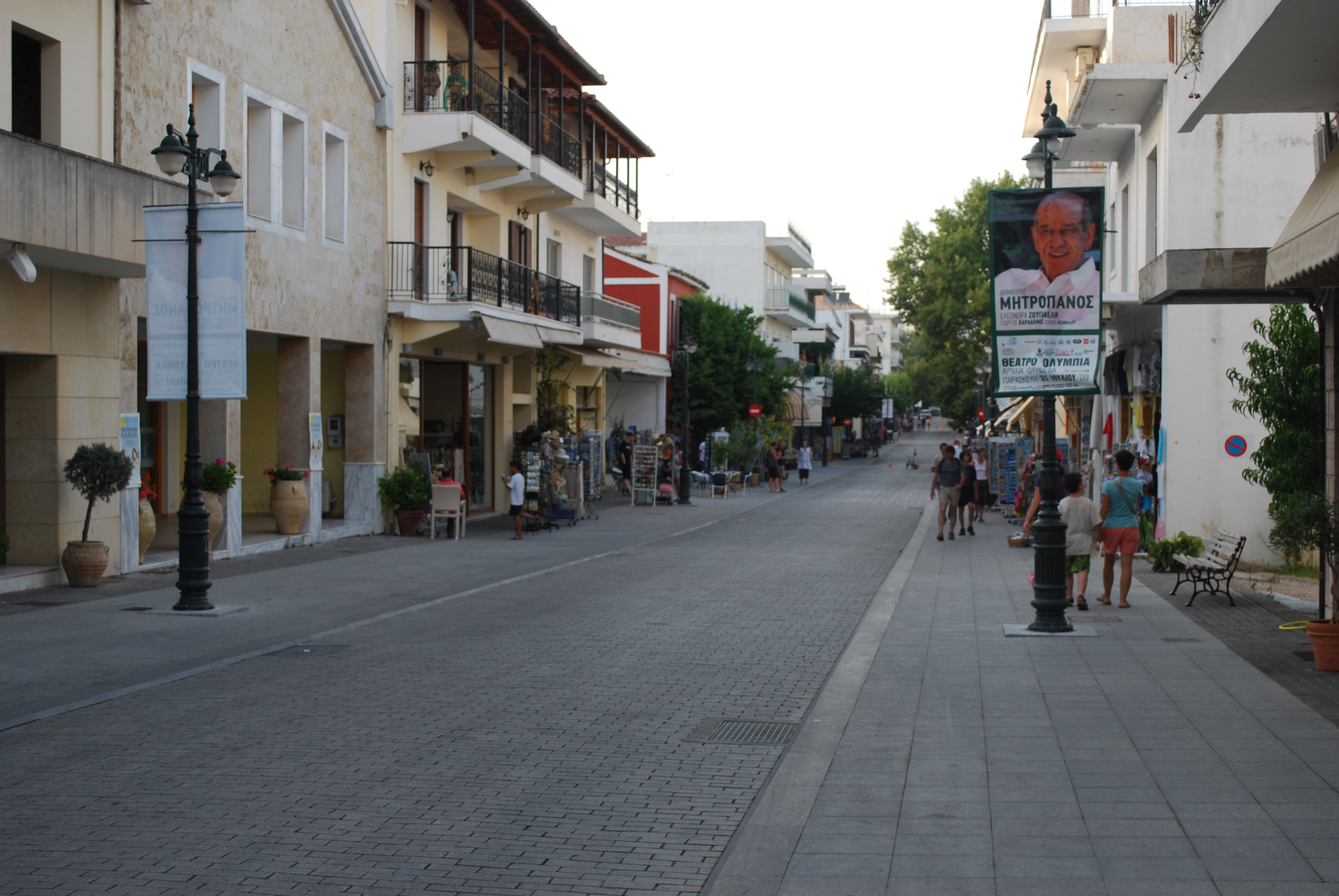 Rue à Olympie.